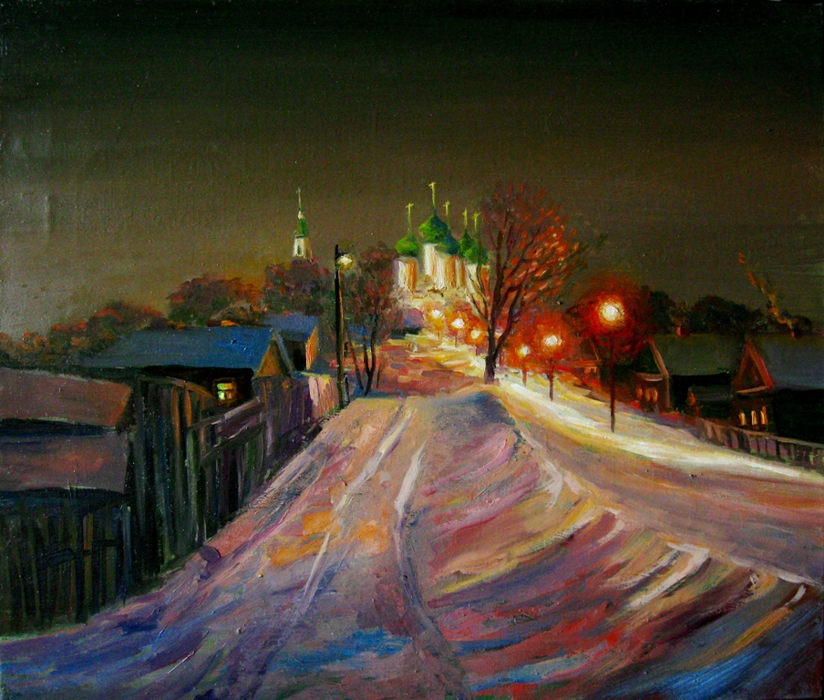 Дорога к храму. Романово-Борисоглебск